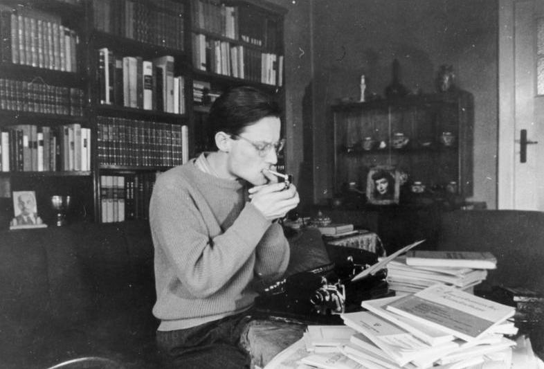 ADN-ZB- Kemlein Wolfgang Harich, marxistischer Theoretiker, von 1949-56 Prof. für Gesellschaftswissenschaften an der Humboldt-Universität in Berlin. geb. 09.12.1921 in Königsberg W. Harich in seiner Wohnung bei der Arbeit. Aufnahme: Eva Kemlein; um 1947 2155-48